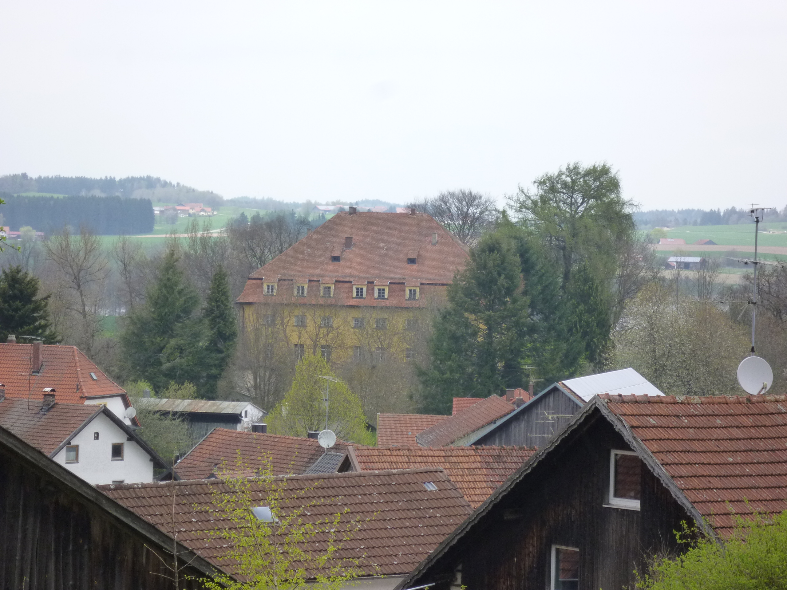 Blick auf das Schloss Wiesenfelden, Straubinger Str. 5. Das Schloss mit Ausstattung wurde 1105 erstmals urkundlich erwähnt. Es ist heute ein Umweltbildungszentrum. Bis 2007 unter der Federführung des Bund Naturschutz. Seit 2008 wird es auf die "Freunde und Förderer des Umweltzentrums Schloss Wiesenfelden übergegangen. Das Schloss gehört zu den ältesten Umweltbildungsstätten und zur Liste der Baudenkmäler in Wiesenfelden mit der Nr. D-2-78-197-4.